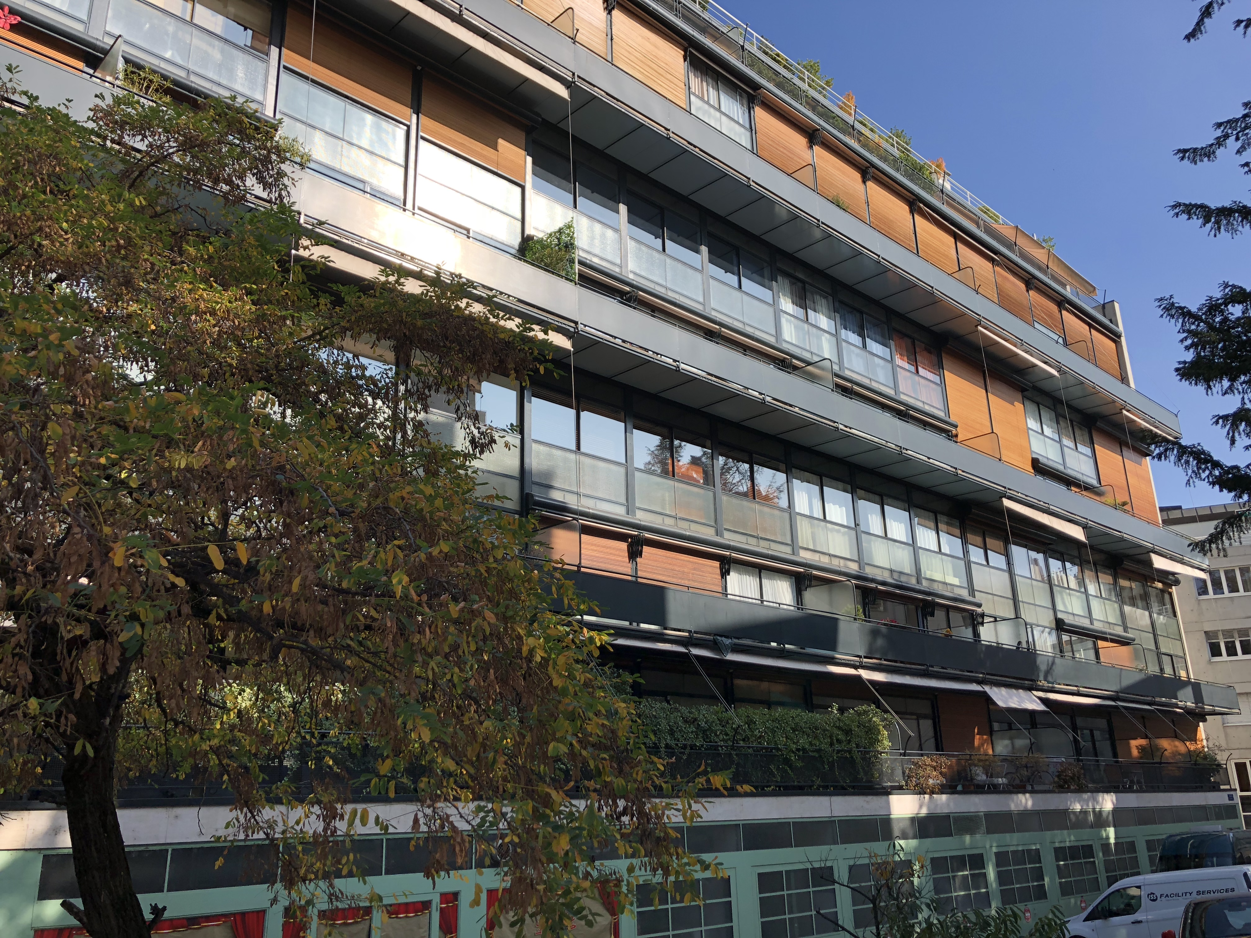 Stores verticales en bois